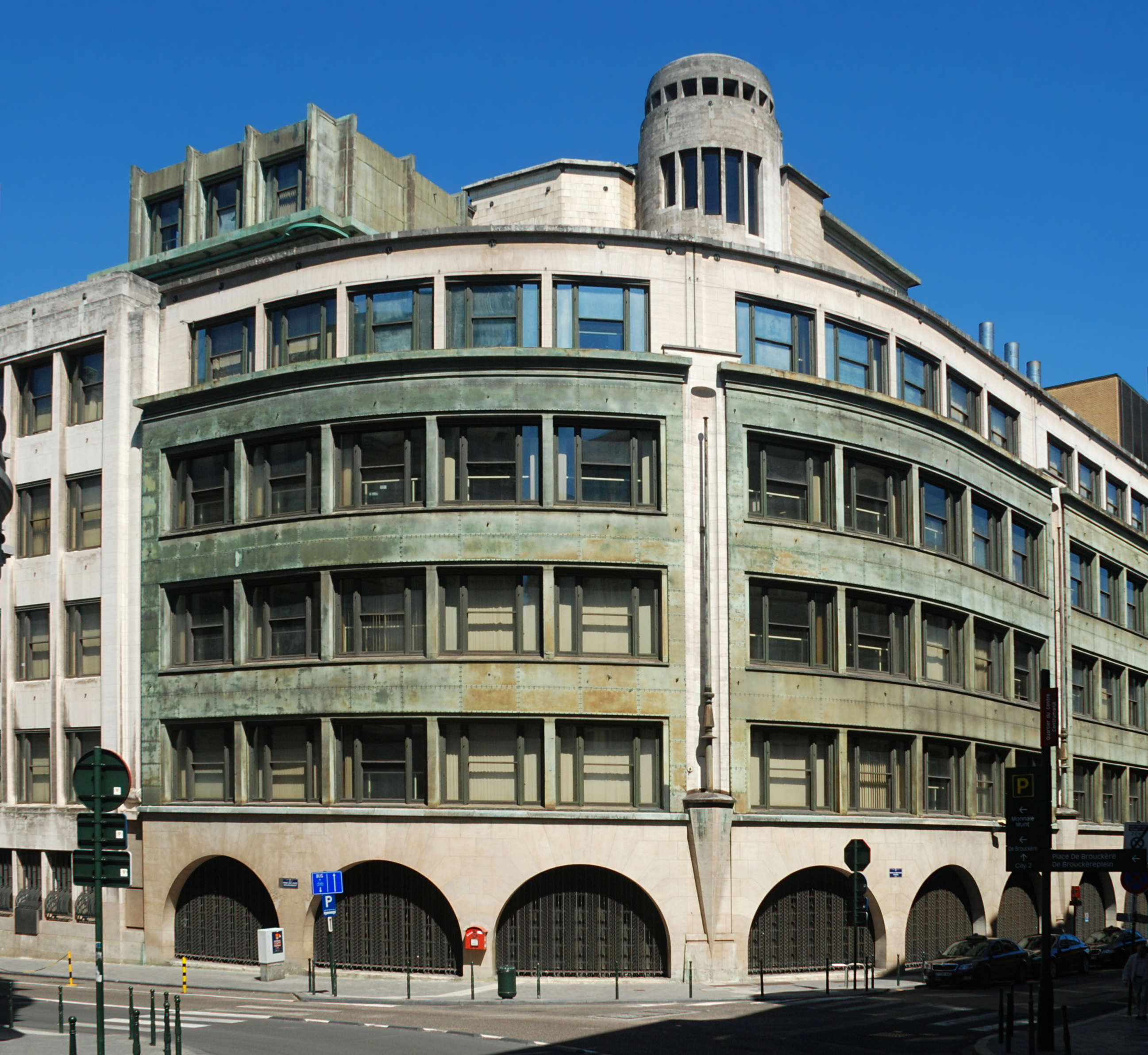 Belgique - Bruxelles - Bâtiment Chambon de la CGER - rue du Fossé aux Loups 48 - Architecture monumentale en Belgique - architecte Alfred Chambon - 1947-1953